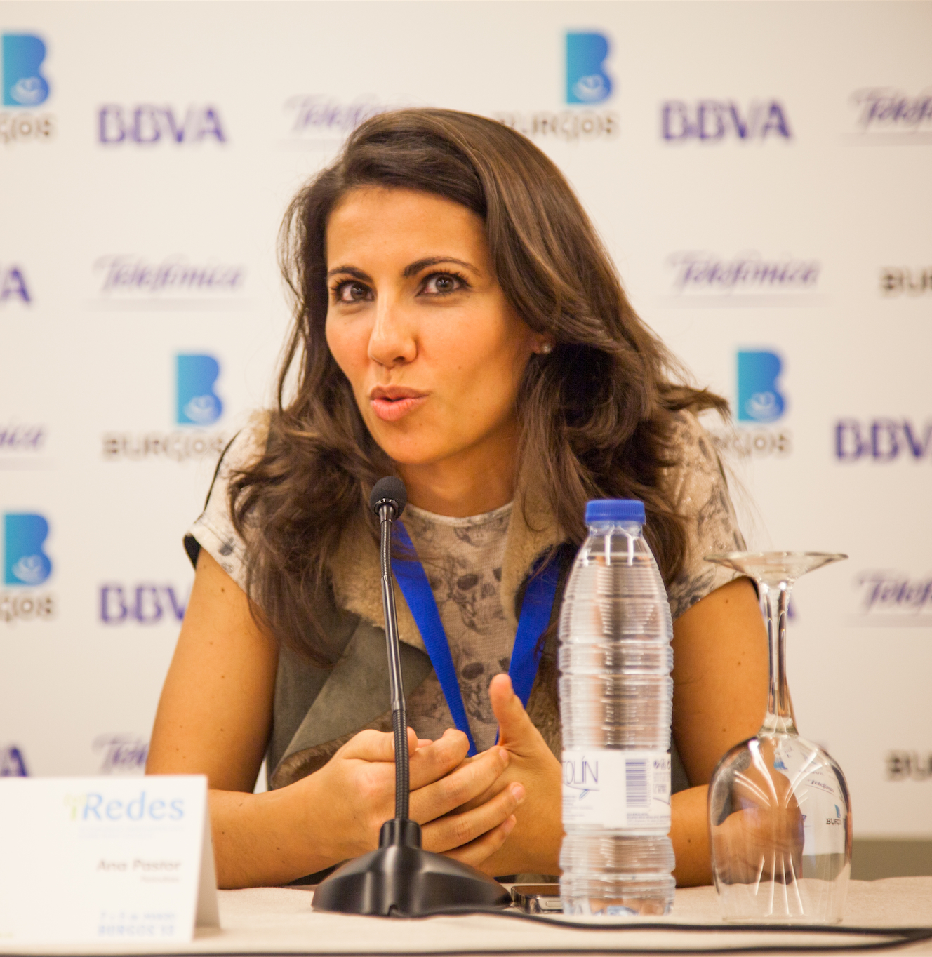 Fotos por Victoriano Izquierdo - @victorianoi